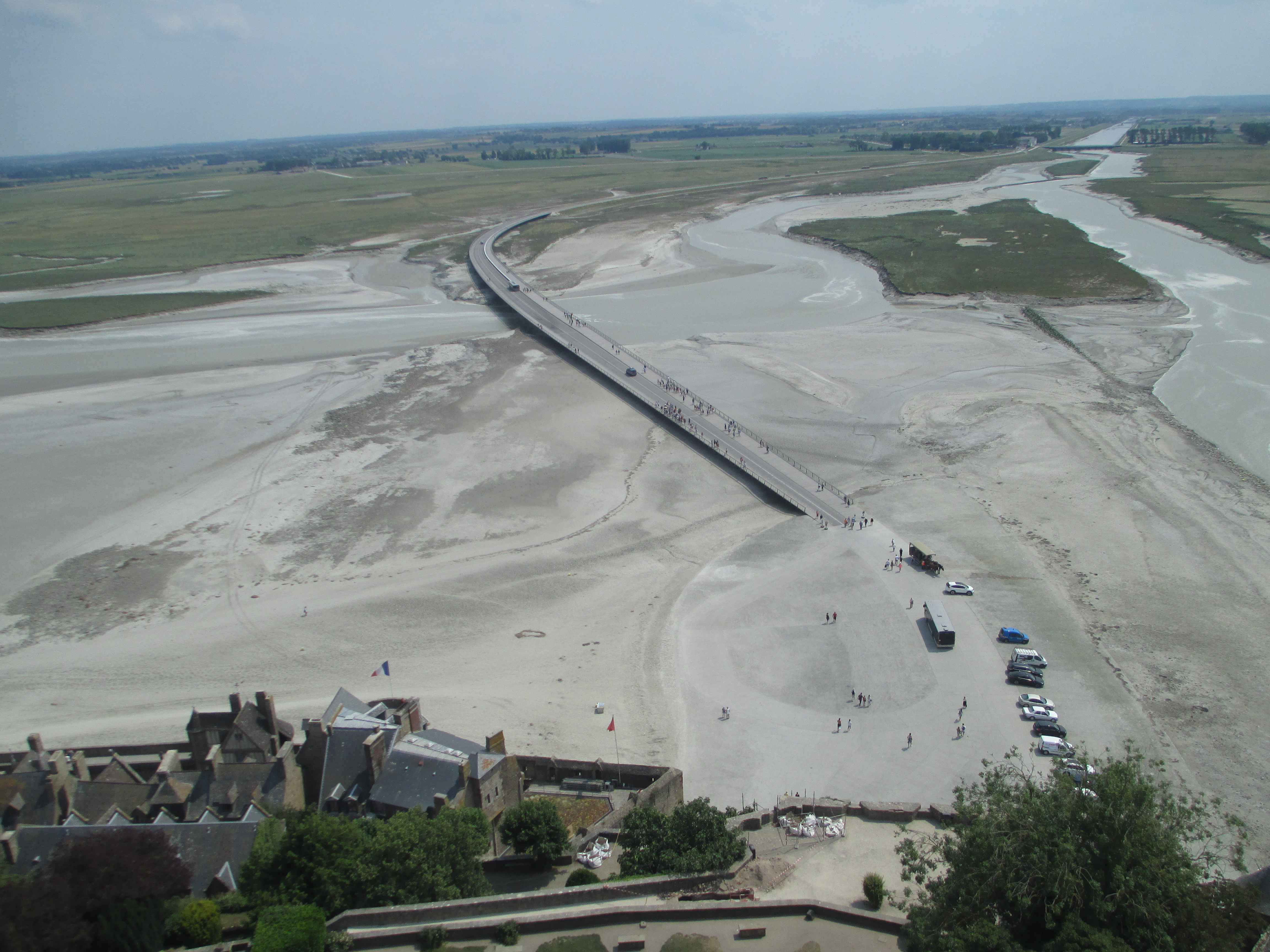 מבט ממון סן מישל על הדרך המובילה למנזר